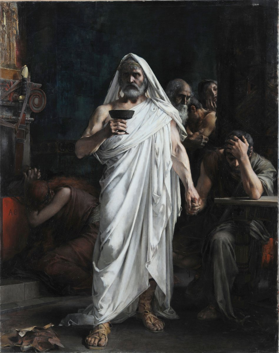 Thémistocle buvant le poisontitle QS:P1476,fr:"Thémistocle buvant le poison" label QS:Lfr,"Thémistocle buvant le poison"